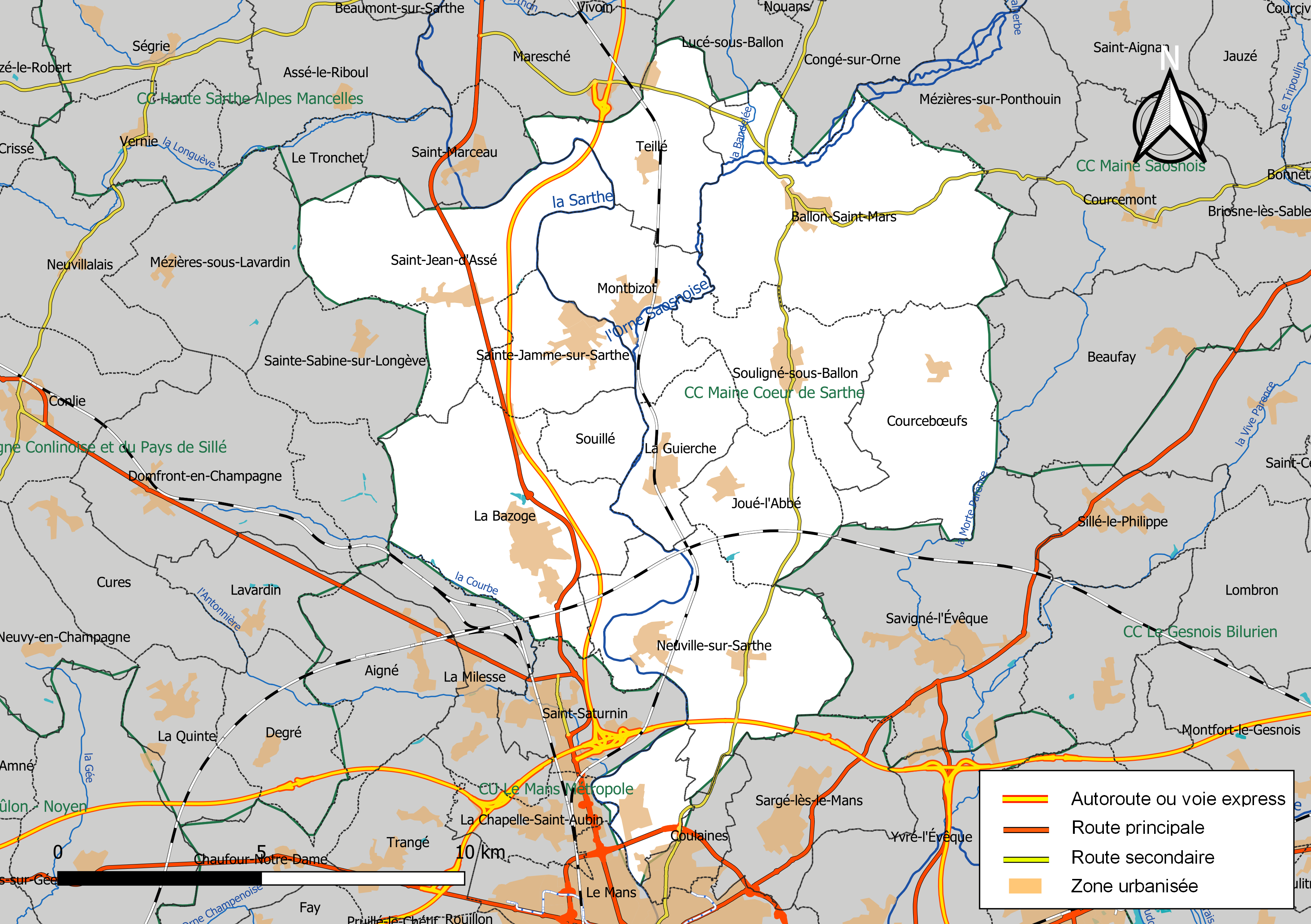 Carte géographique de la Communauté de communes Maine Cœur de Sarthe, département de la Sarthe, France. Composition au 1er janvier 2019.